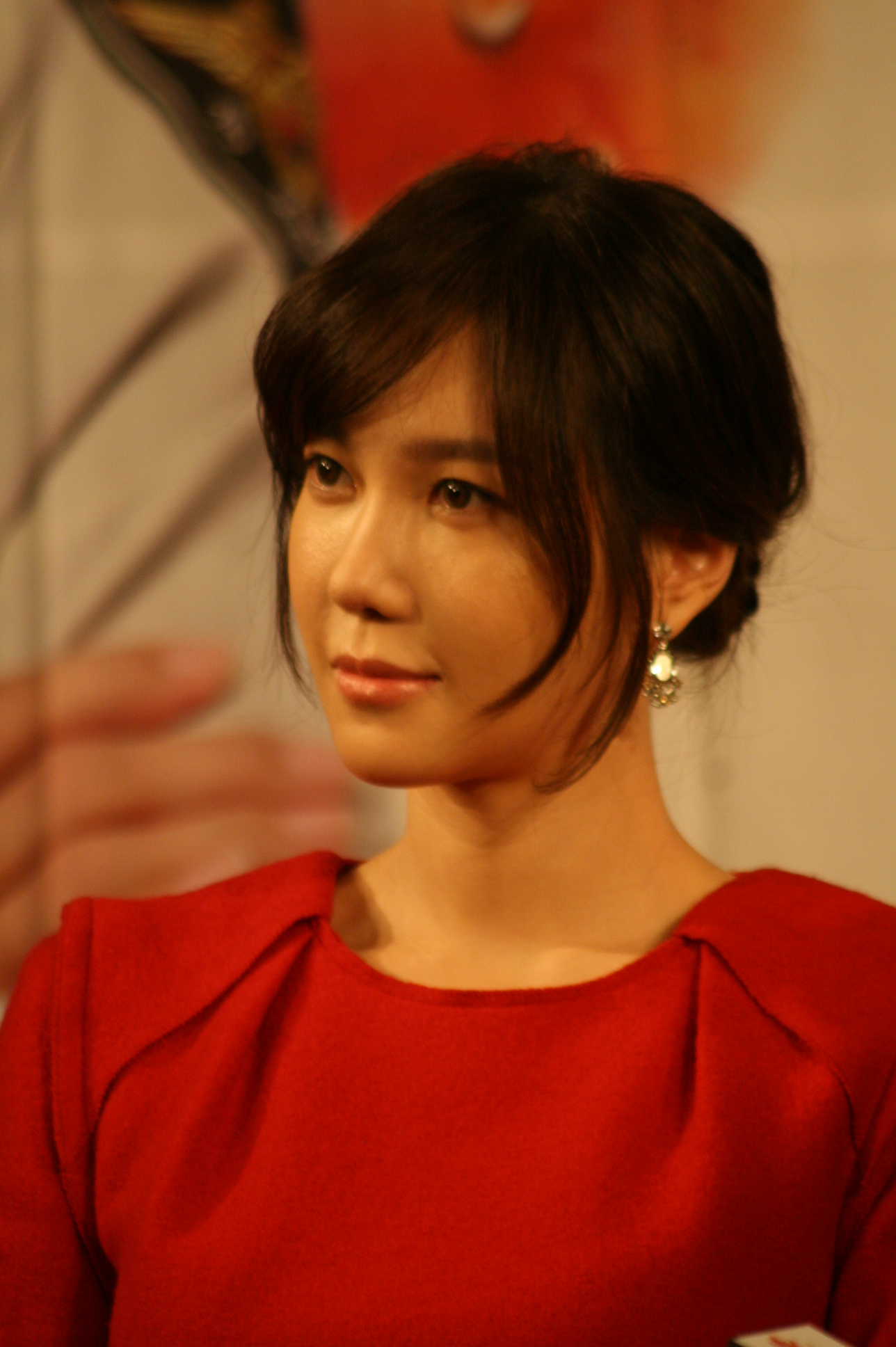 나도꽃 523